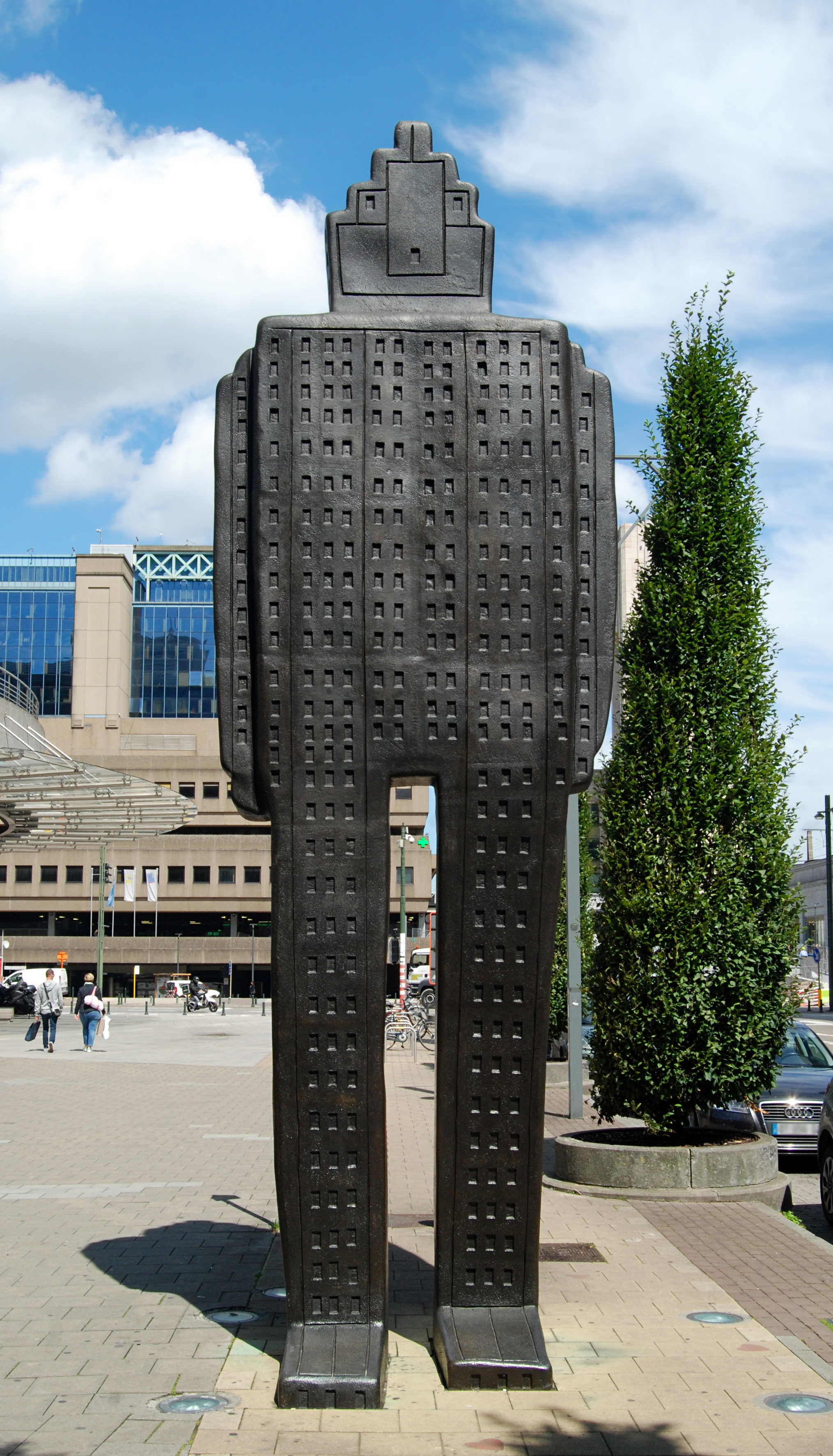 Belgique - Bruxelles - rue du Progrès - Jean-Michel Folon - La ville en marche - 2001